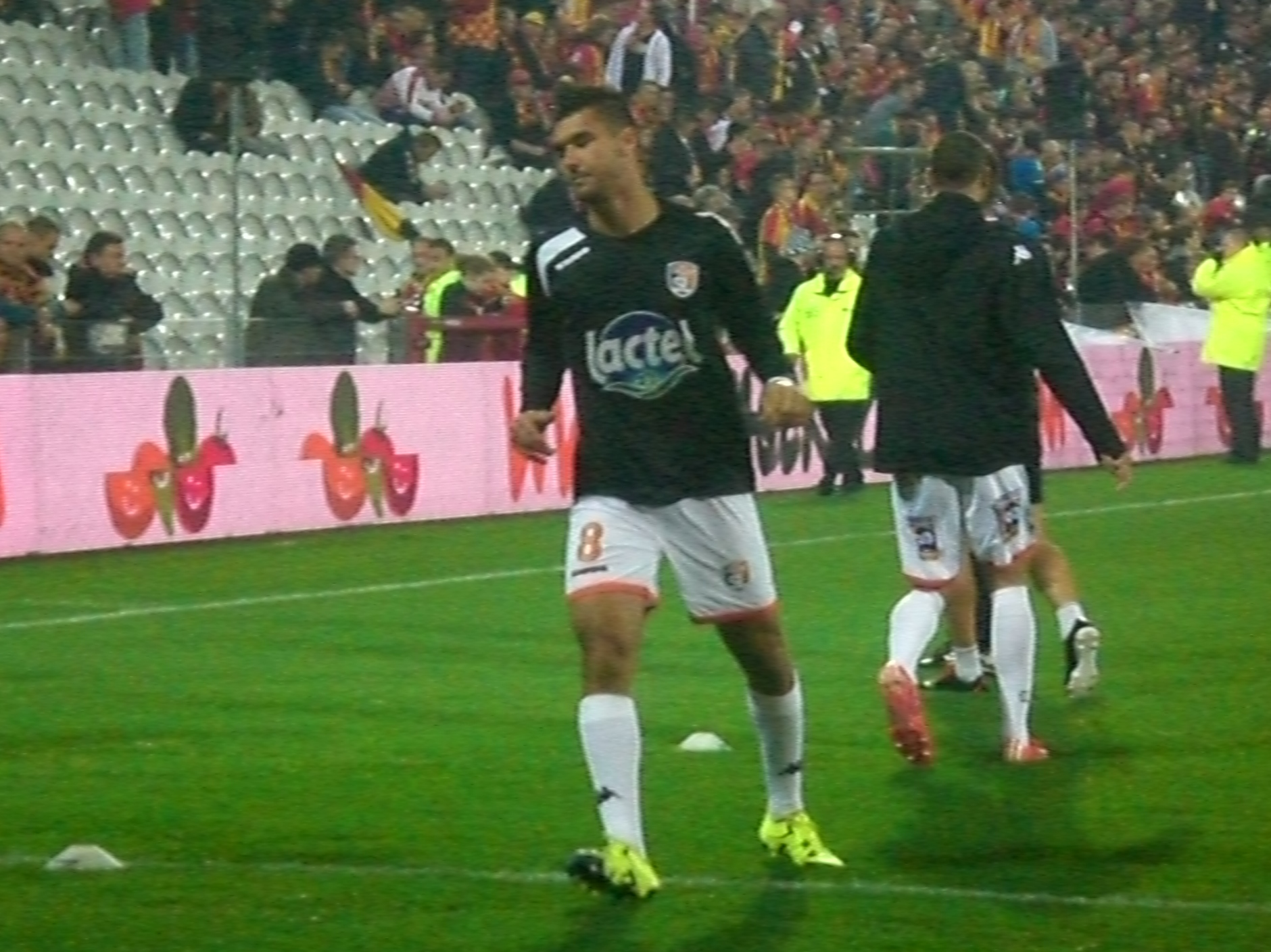 Adrien Monfray avant le match RC Lens / Stade Lavallois, comptant pour la onzième journée du Championnat de France de football de Ligue 2, le 19 octobre 2015, au Stade Bollaert Delelis